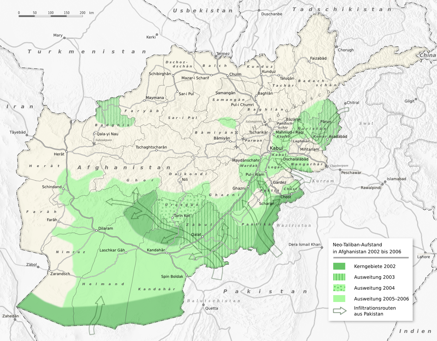 Ausweitung der Einflussgebiete des Neotaliban-Aufstands in Afghanistan von 2002 bis 2006